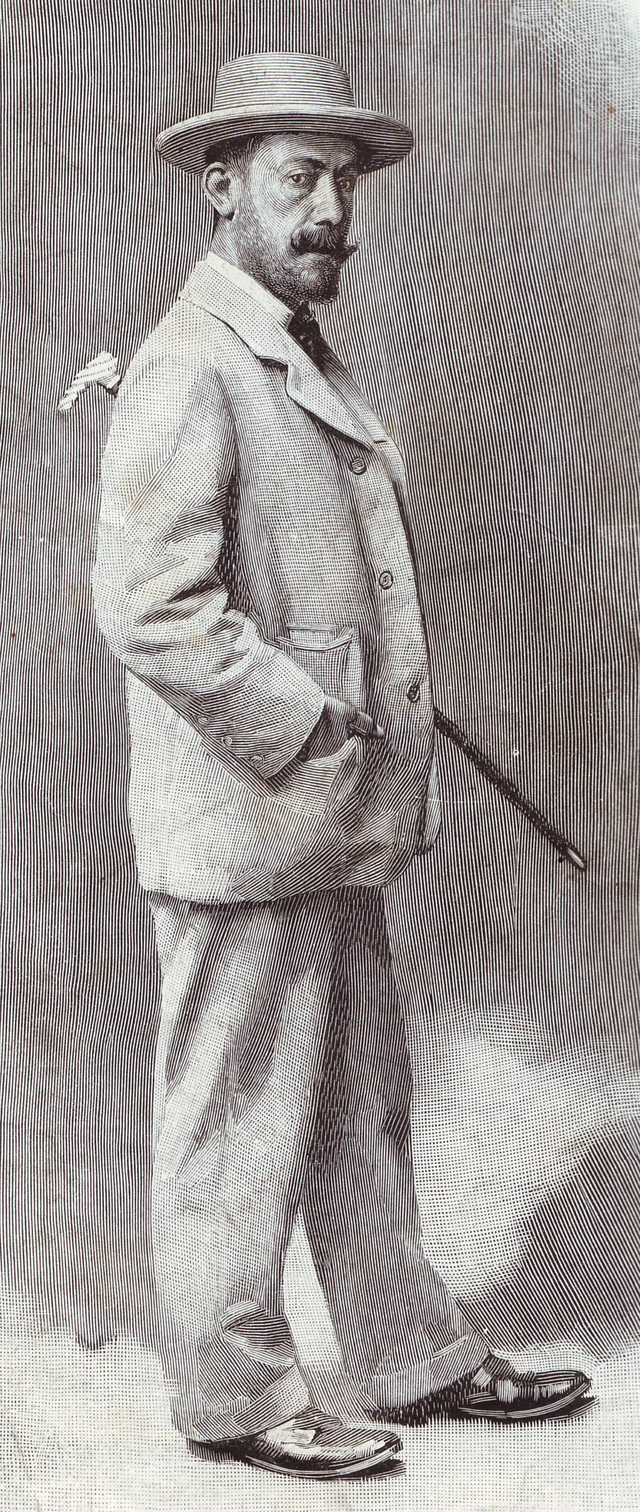 Riproduzione del ritratto (senza nome dell'autore) di Cesare Pascarella comparso sulla prima di copertina nel numero 6 (Giugno 1894) del periodico «La Tribuna illustrata», stampato a Roma dallo Stabilimento tipografico "Tribuna".